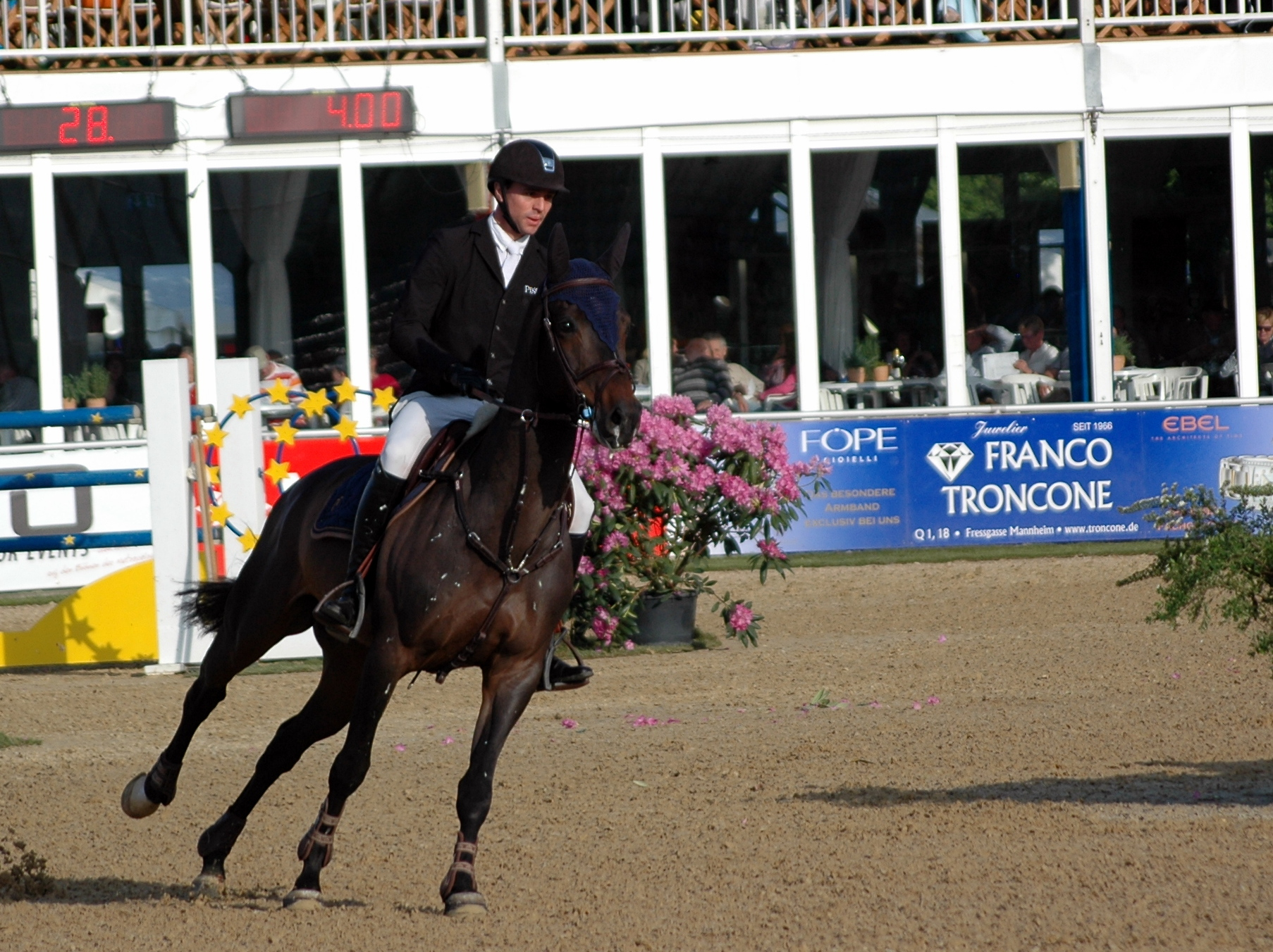 51. Maimarkt-Turnier